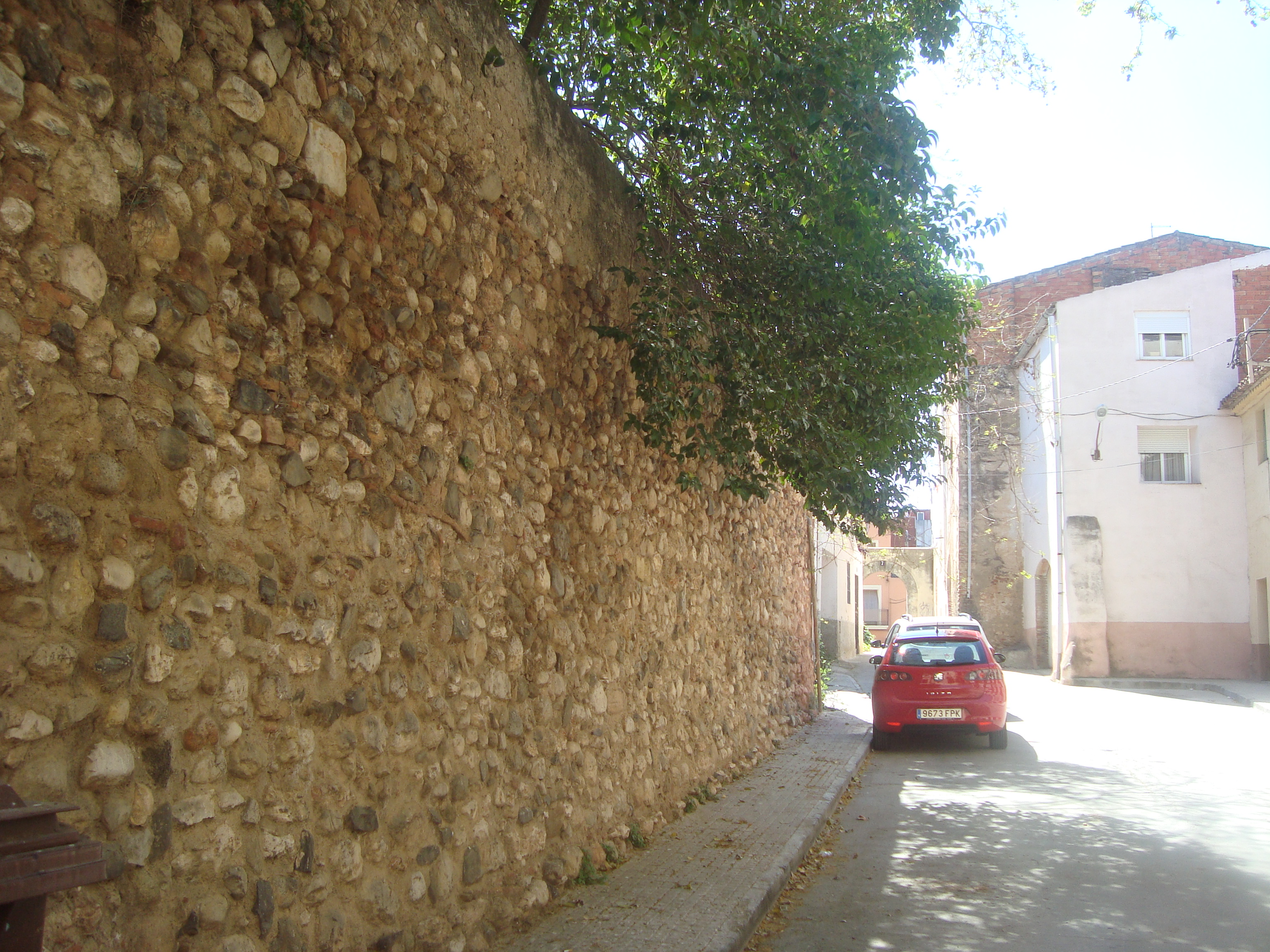 Antiga muralla (el Morell, Tarragona)